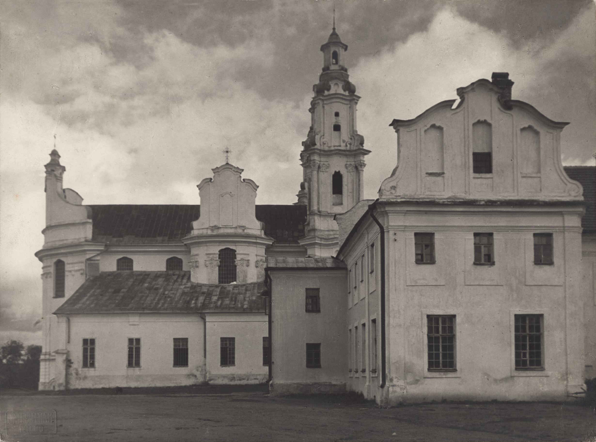 Бакавы фасад. Здымак Я. Булгака 1930-х гг.